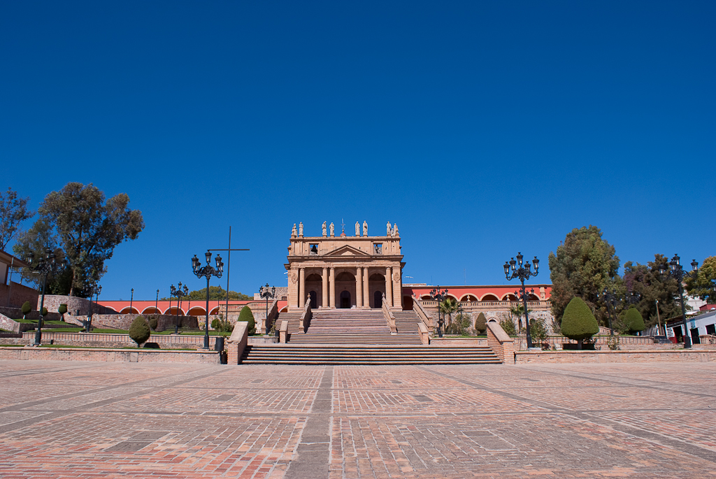 Templo El calvario, Lagos de Moreno